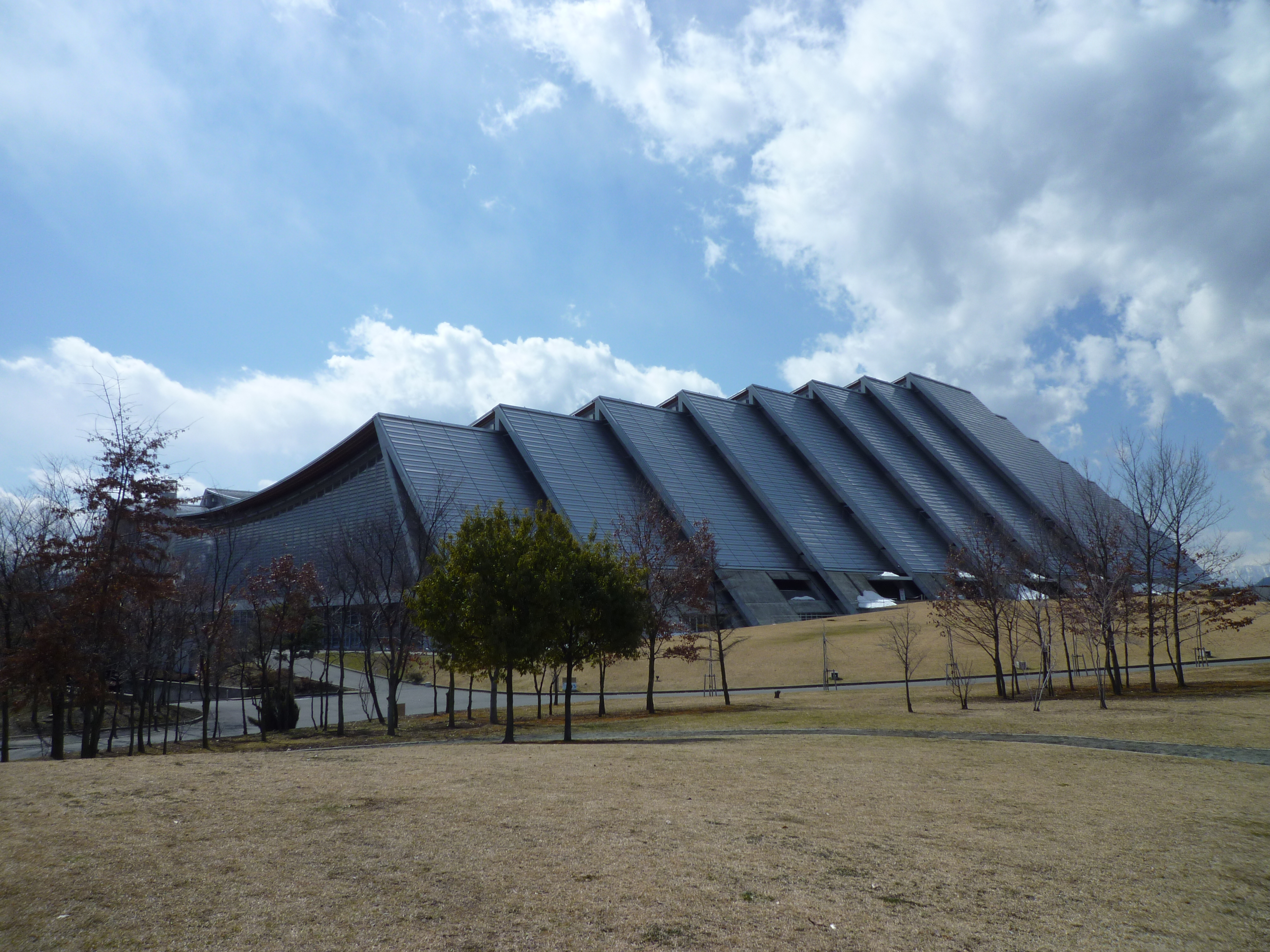 エムウェーブの外観写真。デジカメで撮影。